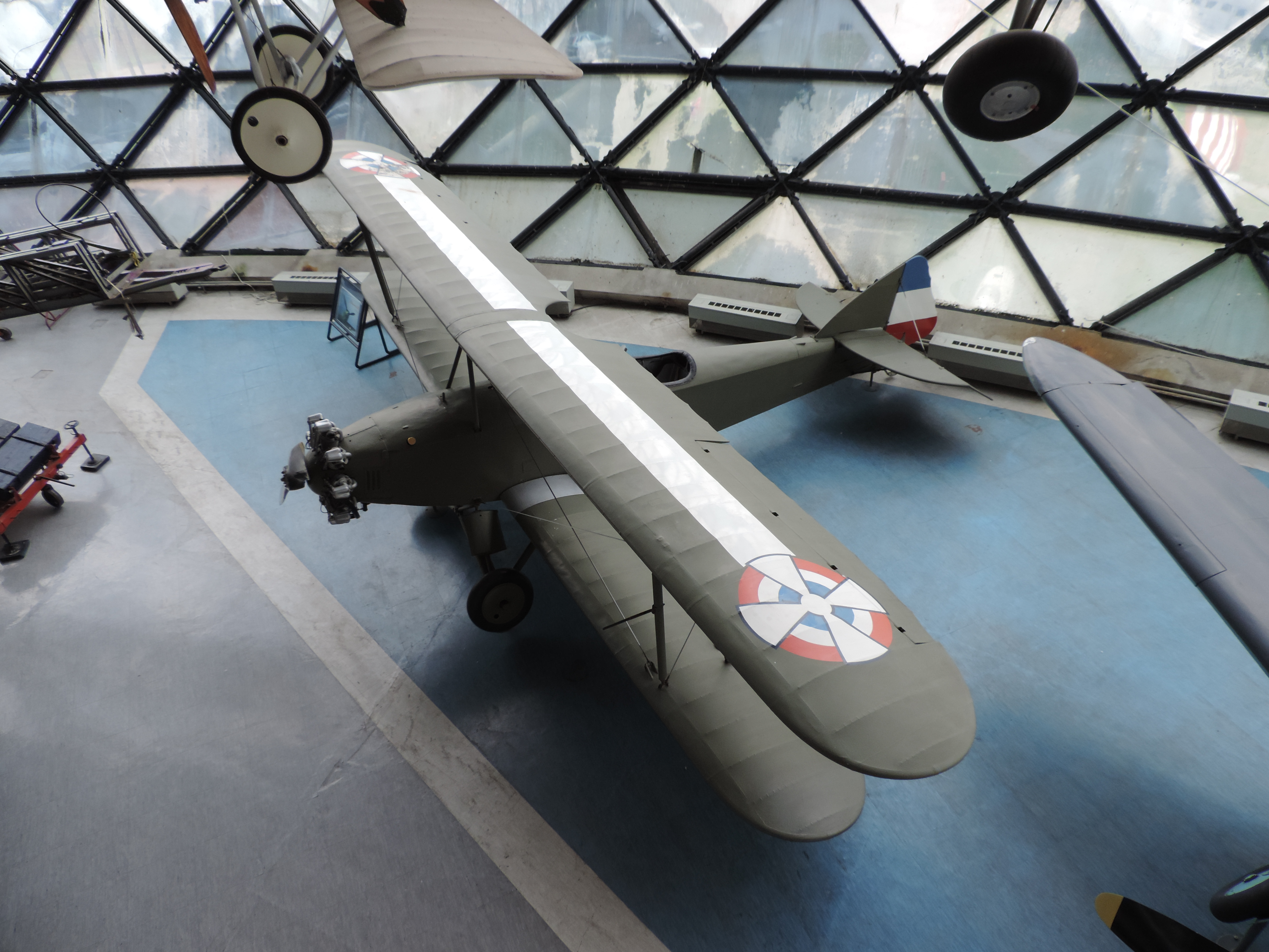 Znaj Fizir FN – Walter im Belgrader Aviation Museum